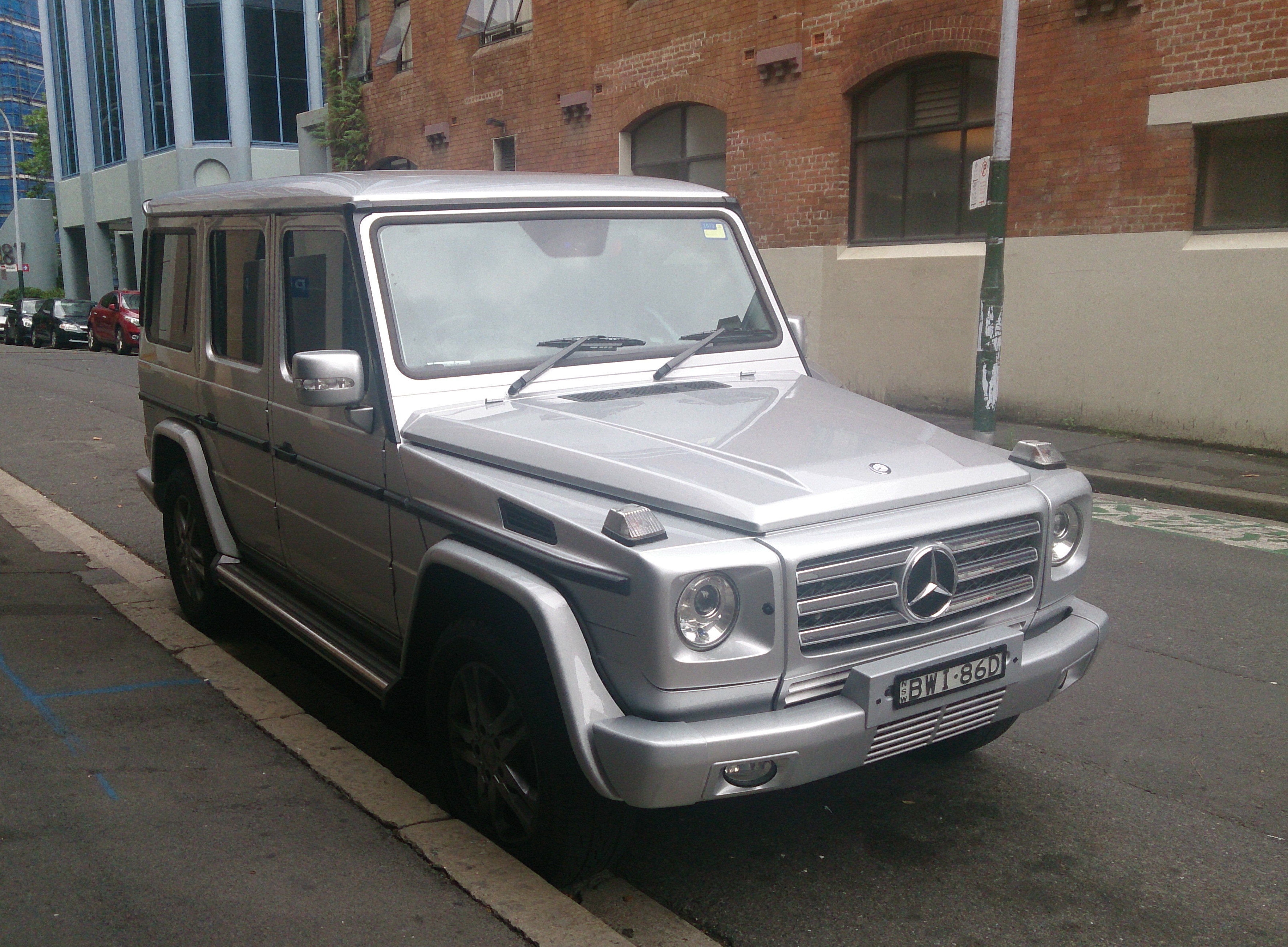 Mercedes-Benz G-wagen